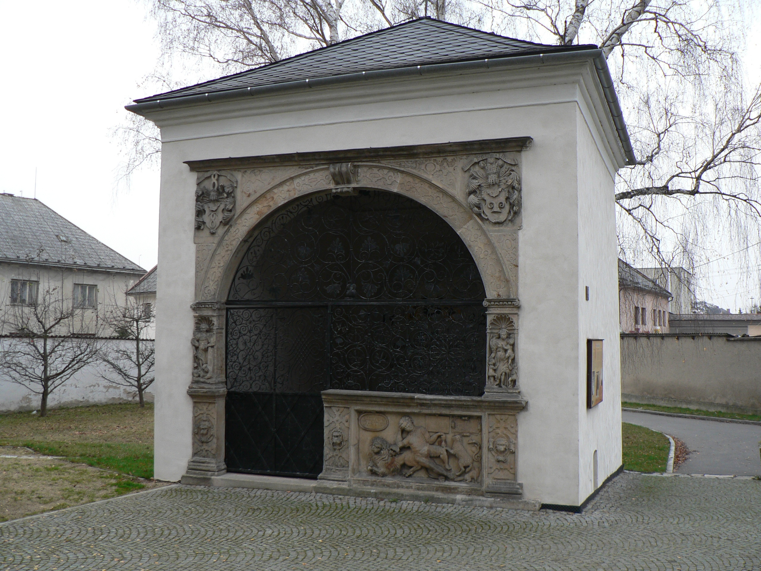 Hrobka Bukůvků u postřelmovského kostela sv. Matouše